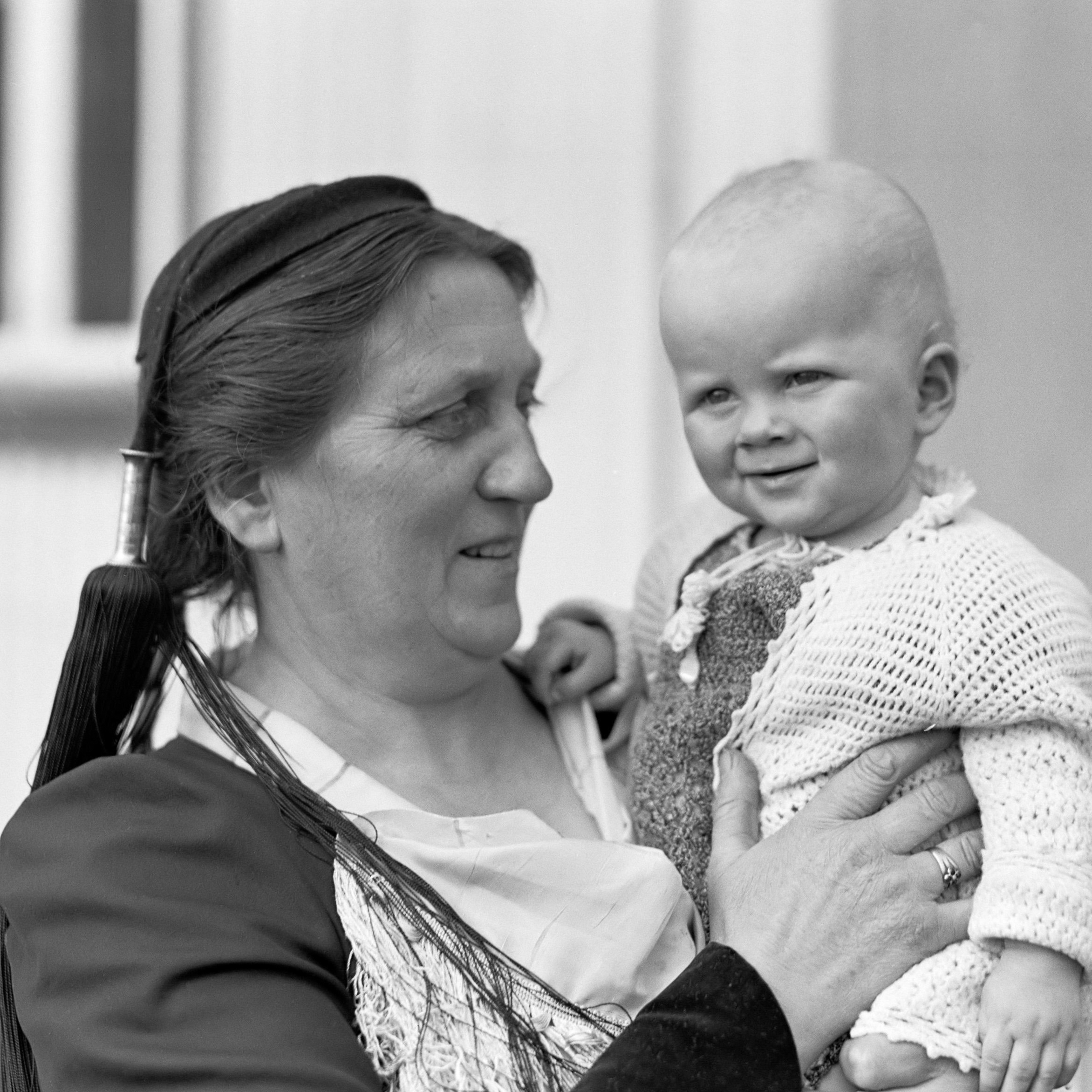 Gudrun Lárusdóttir met haar oudste kleinkind op de arm 1934